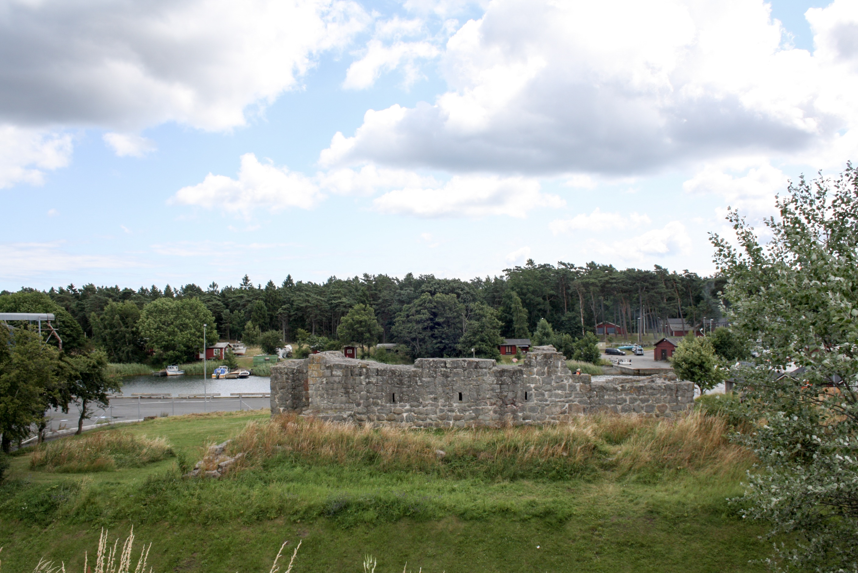 Åhusborgen